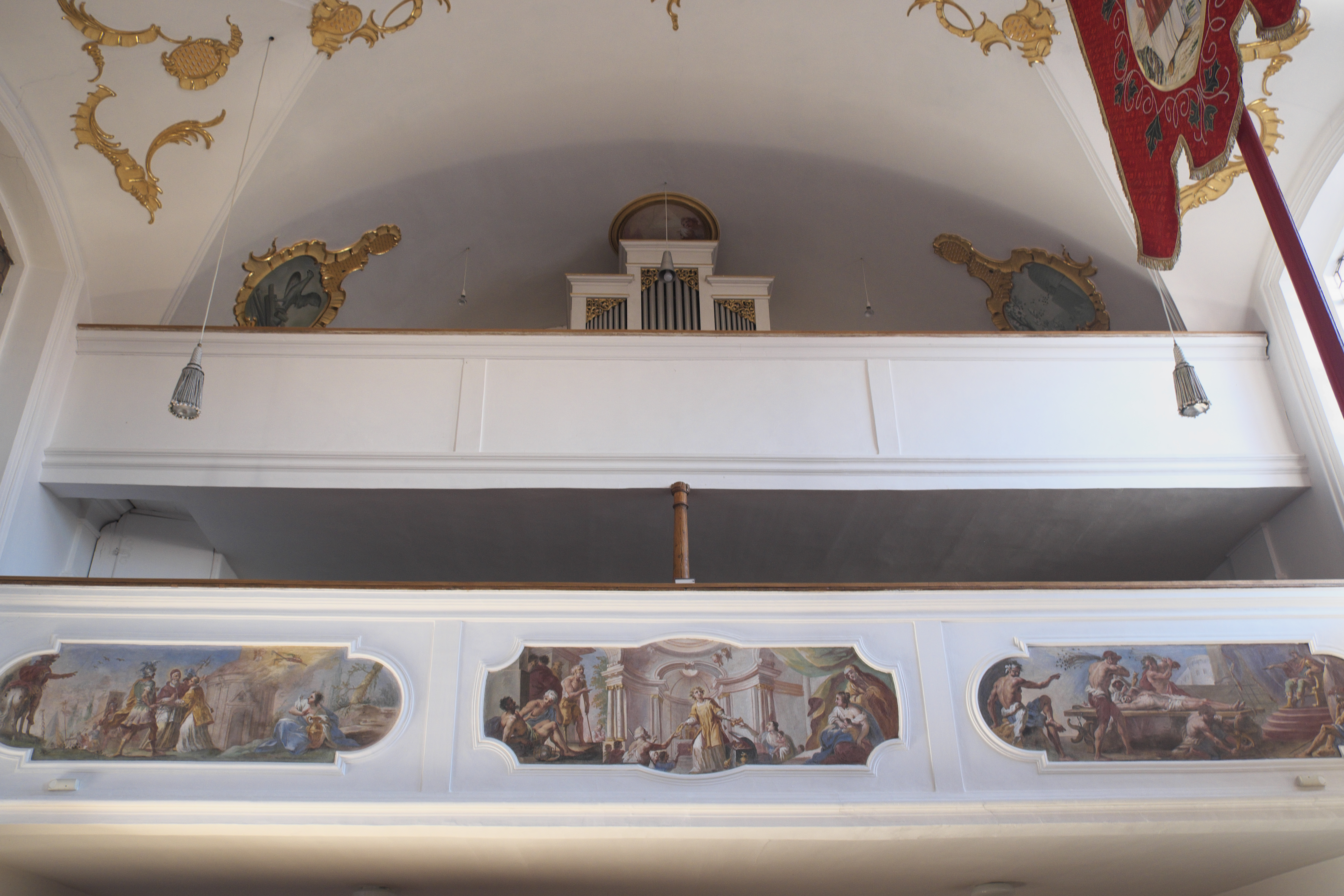 Katholische Filialkirche St. Laurentius in Pflugdorf (Vilgertshofen) im oberbayerischen Landkreis Landsberg am Lech (Bayern/Deutschland), Doppelempore mit Bildern von Johann Baptist Baader mit Szenen der Legende des heiligen Laurentius an der unteren Emporenbrüstung